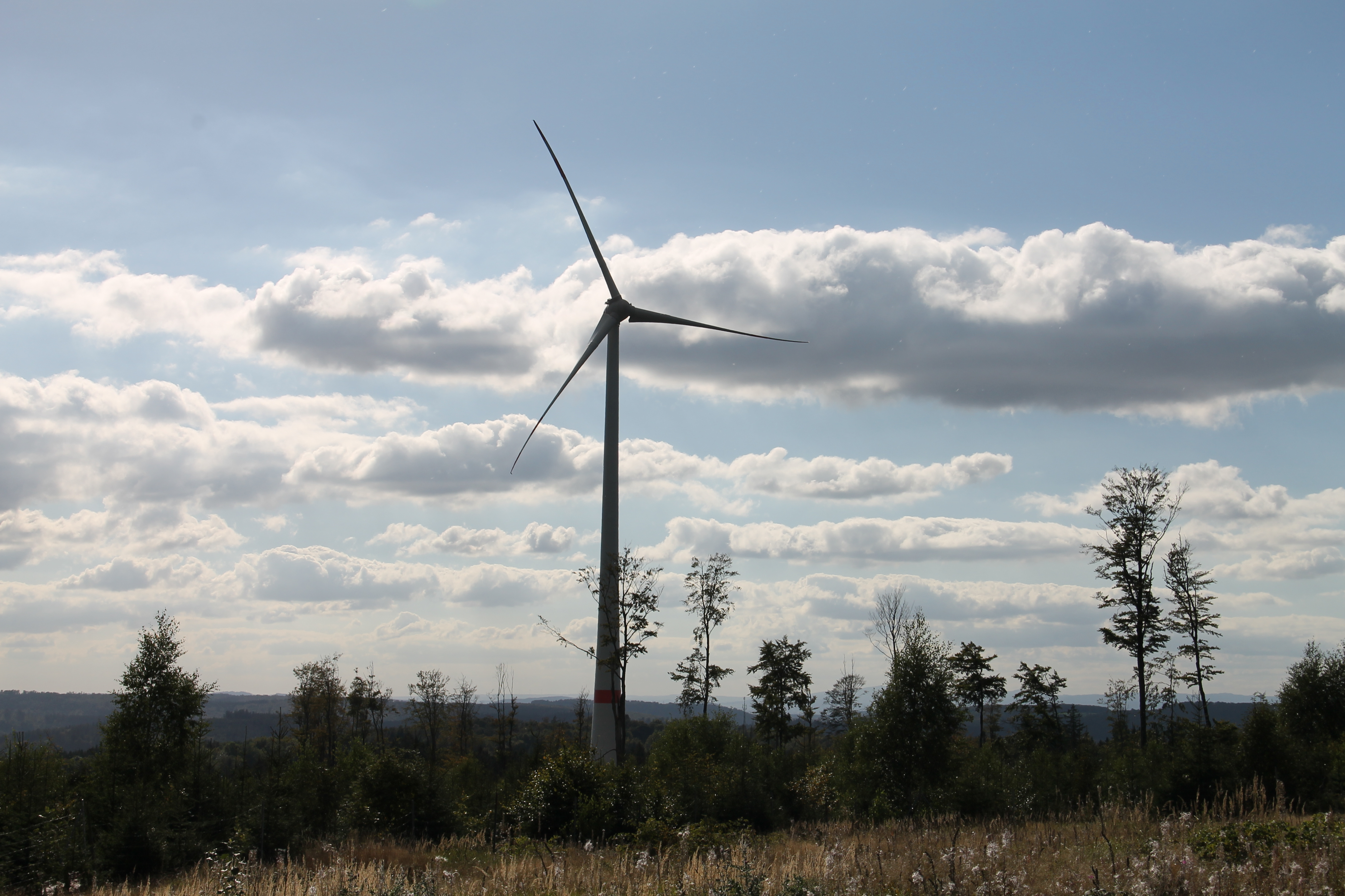 ENERCON E-115, 3 MW, 149 m Nabenhöhe, Windpark Rohrberg, 37235 Hessisch Lichtenau